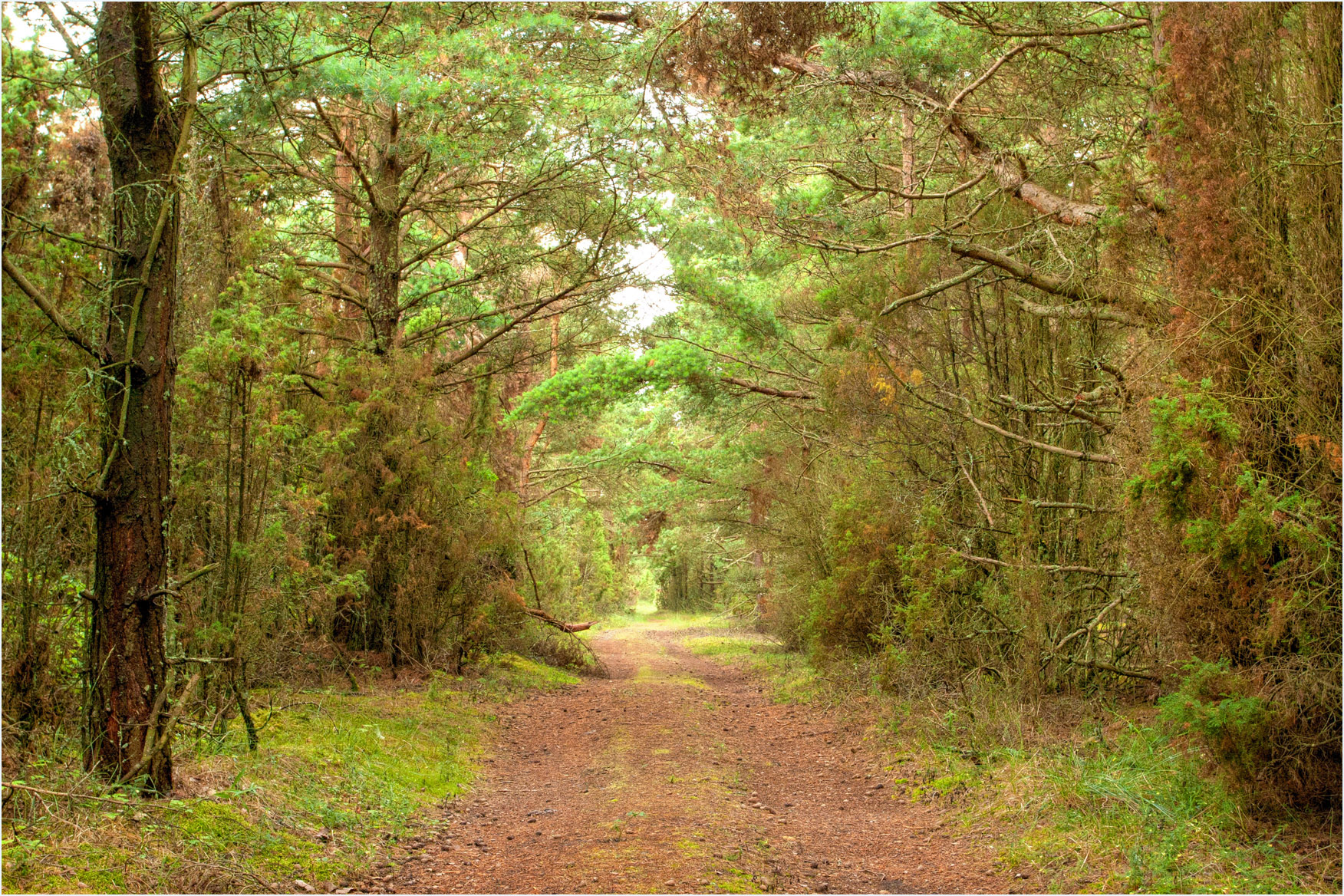 Harilaid